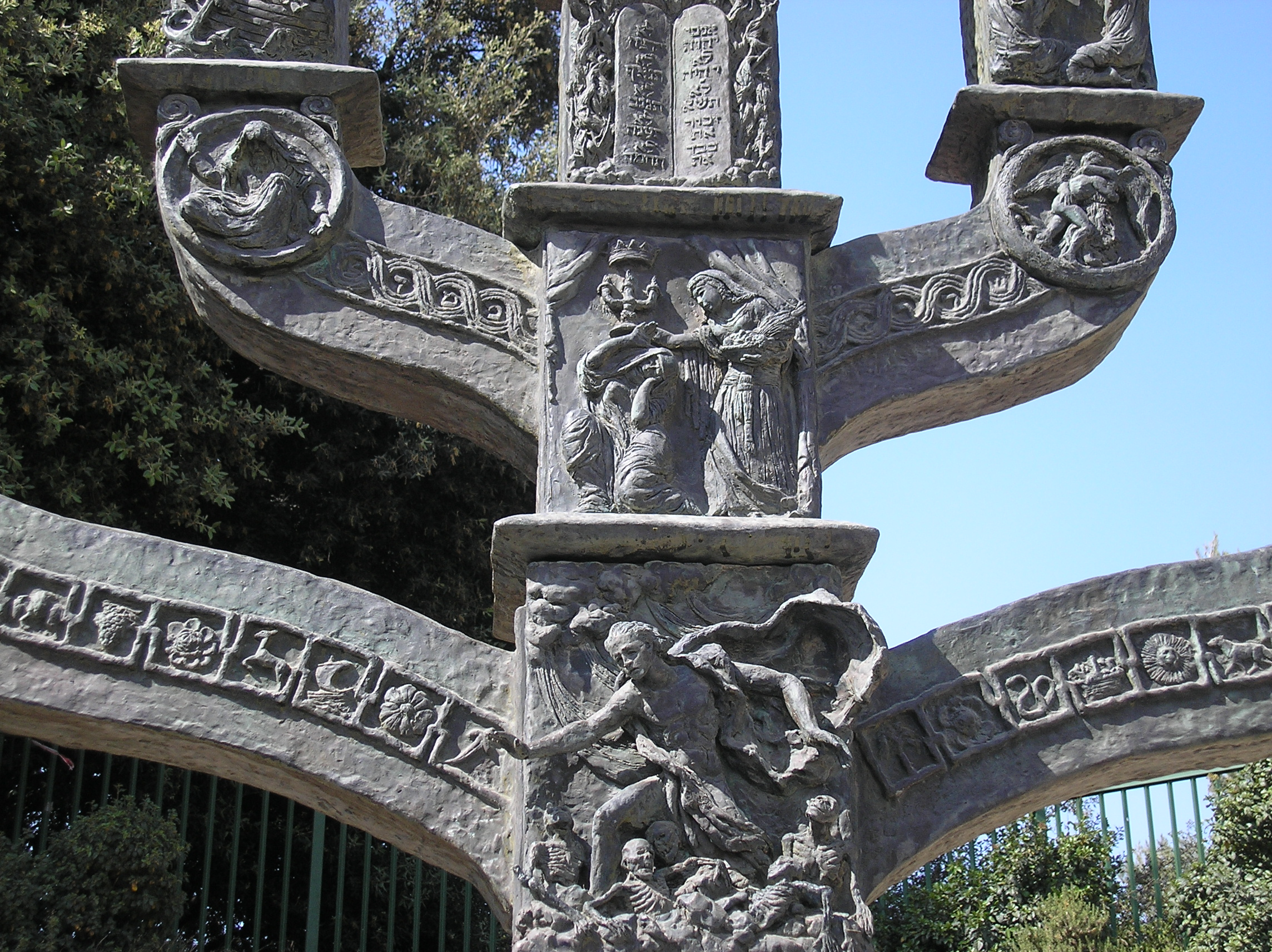 The Knesset Menorah, Jerusalem (detail)